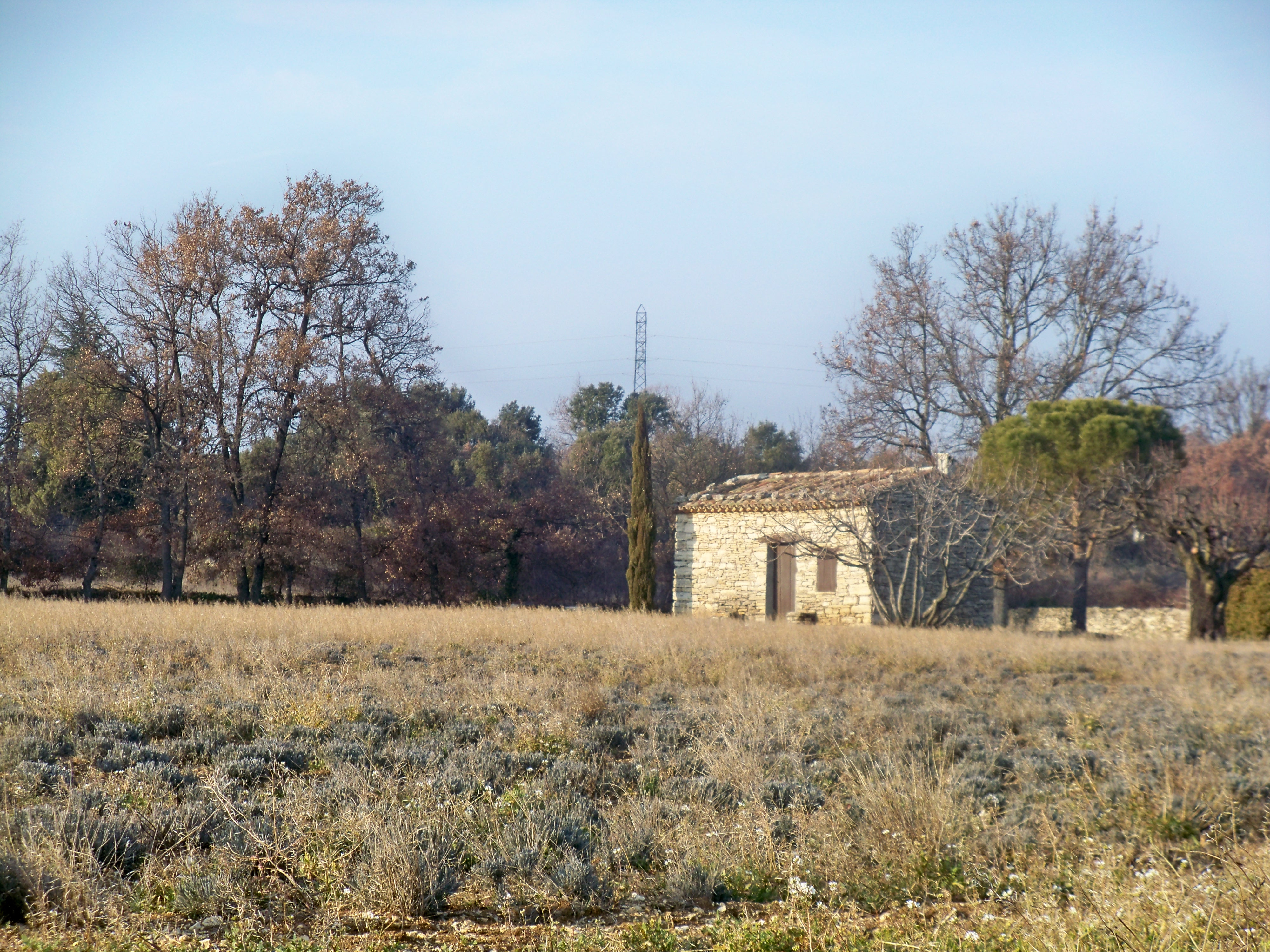 Cabanon à Apt, Vaucluse, France